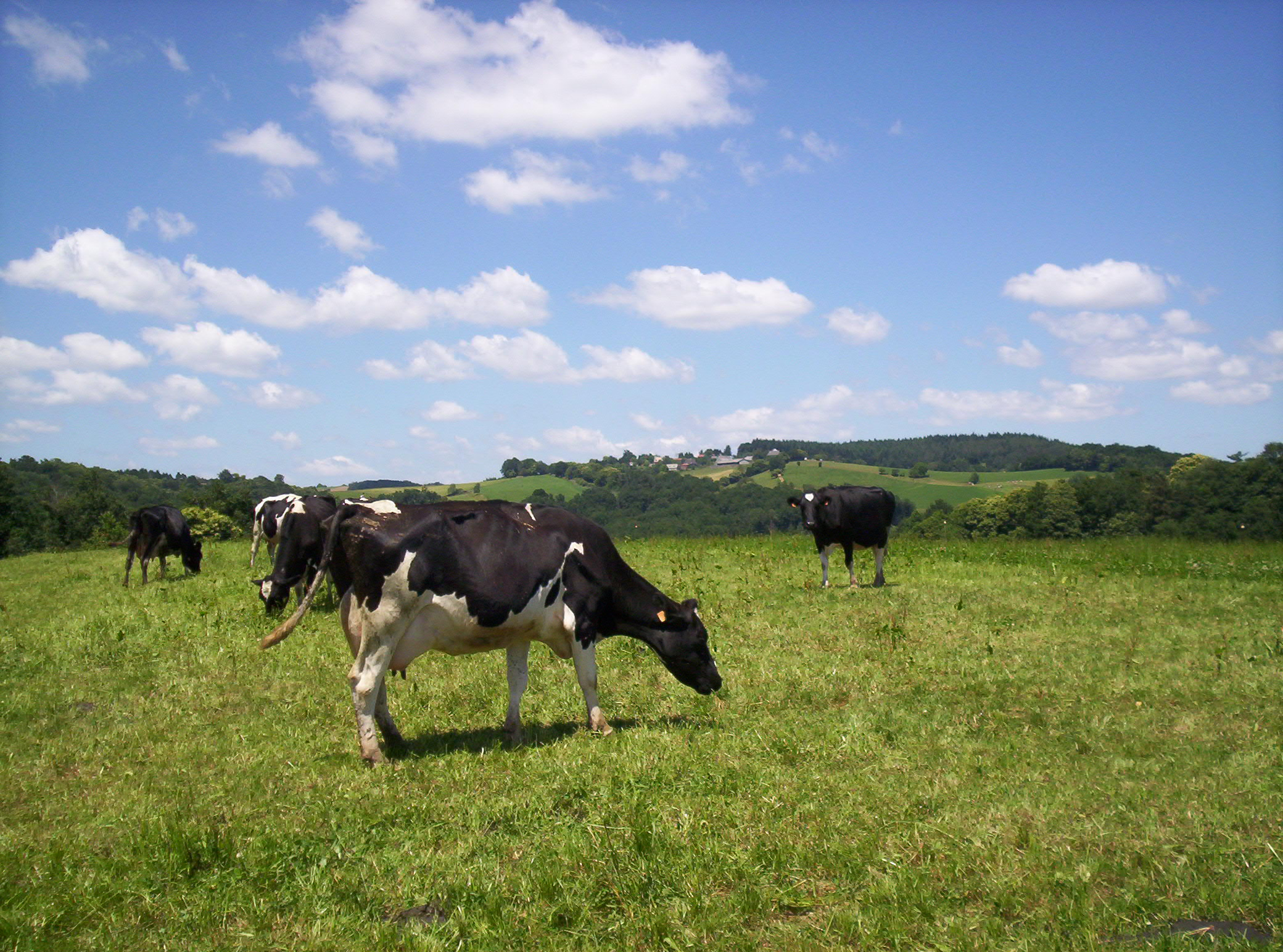 Vache Prim'Holstein en train de brouter dans le Cantal